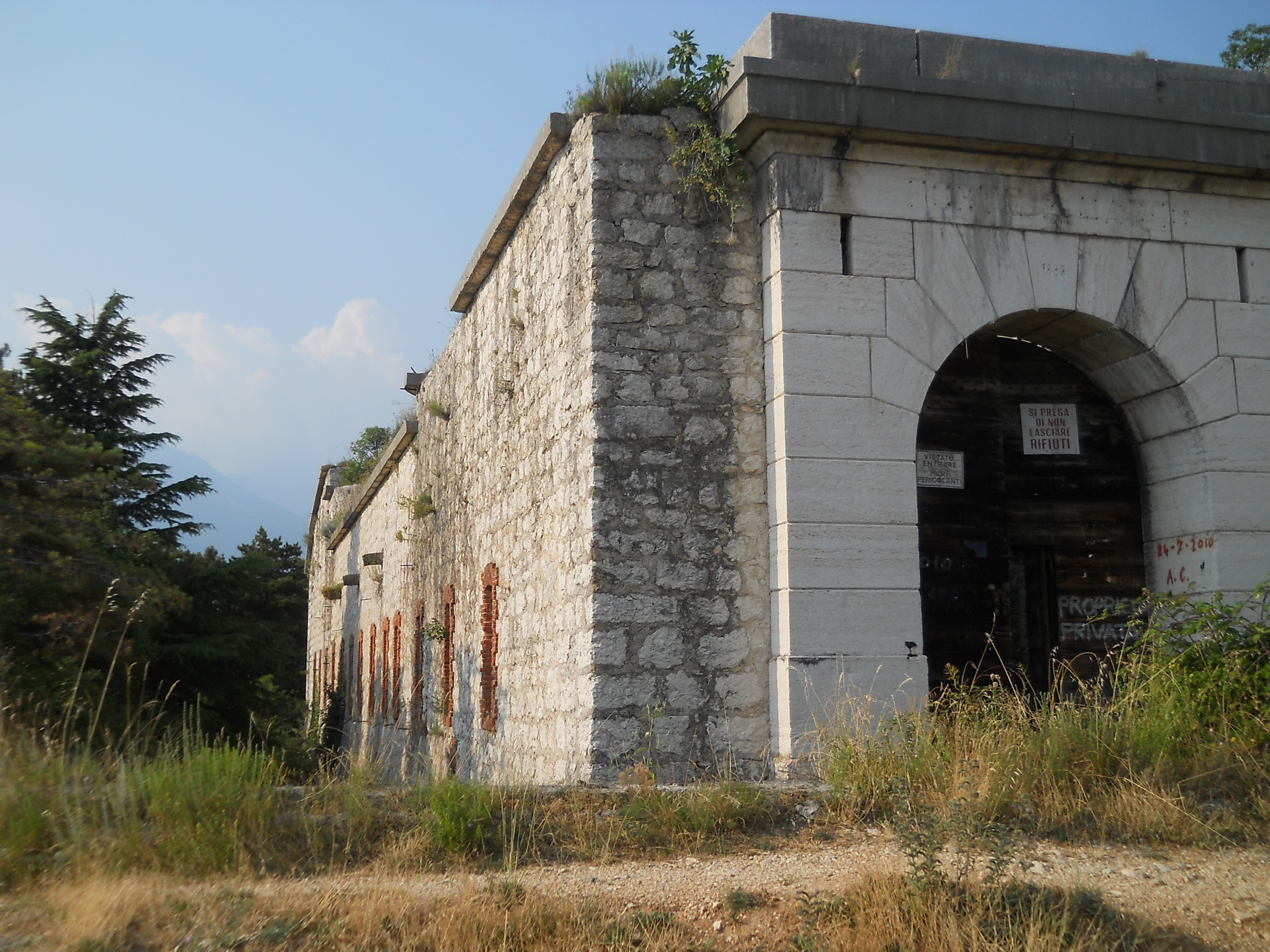 Entrata del forte di San Marco a Rivoli Veronese (Verona)